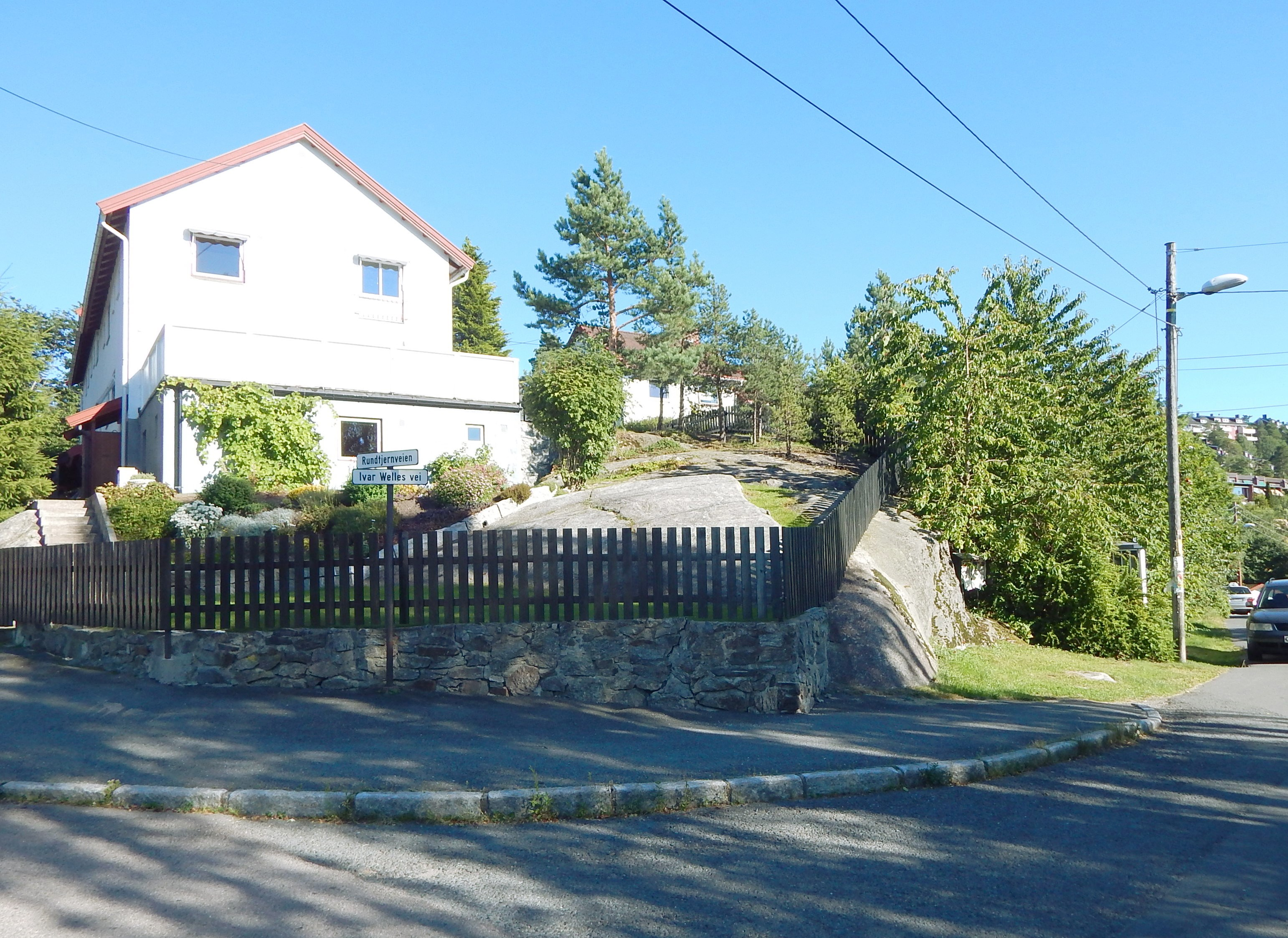 Ivar Welles vei sett fra Rundtjernveien